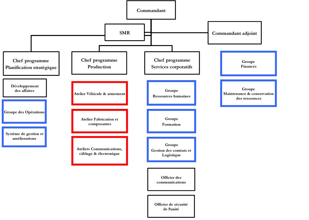 Organigramme du 202 DA